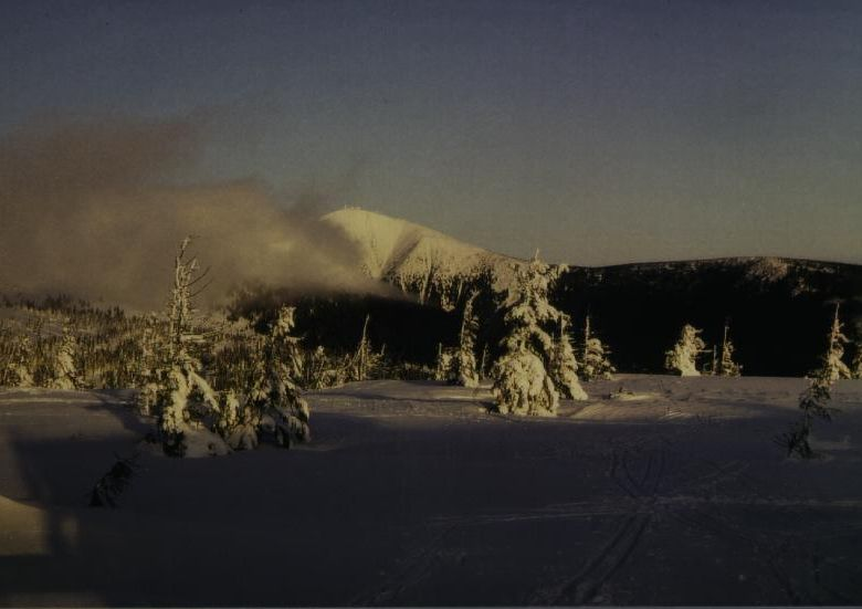 Sněžka (1602) od chalupy Na rozcestí